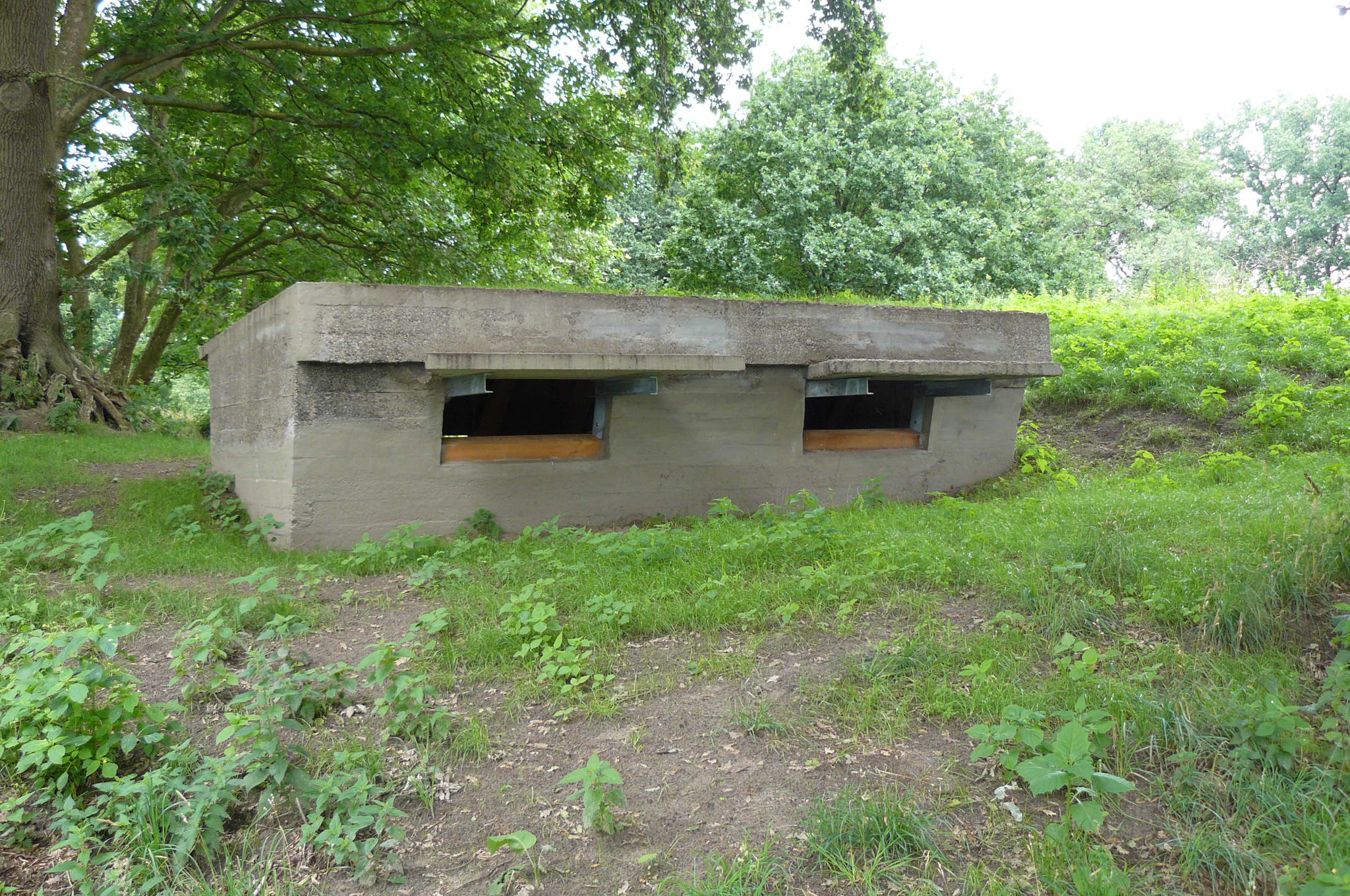 Een gerestaureerde mitrailleurkazemat uit de Eerste Wereldoorlog op het fort terrein.